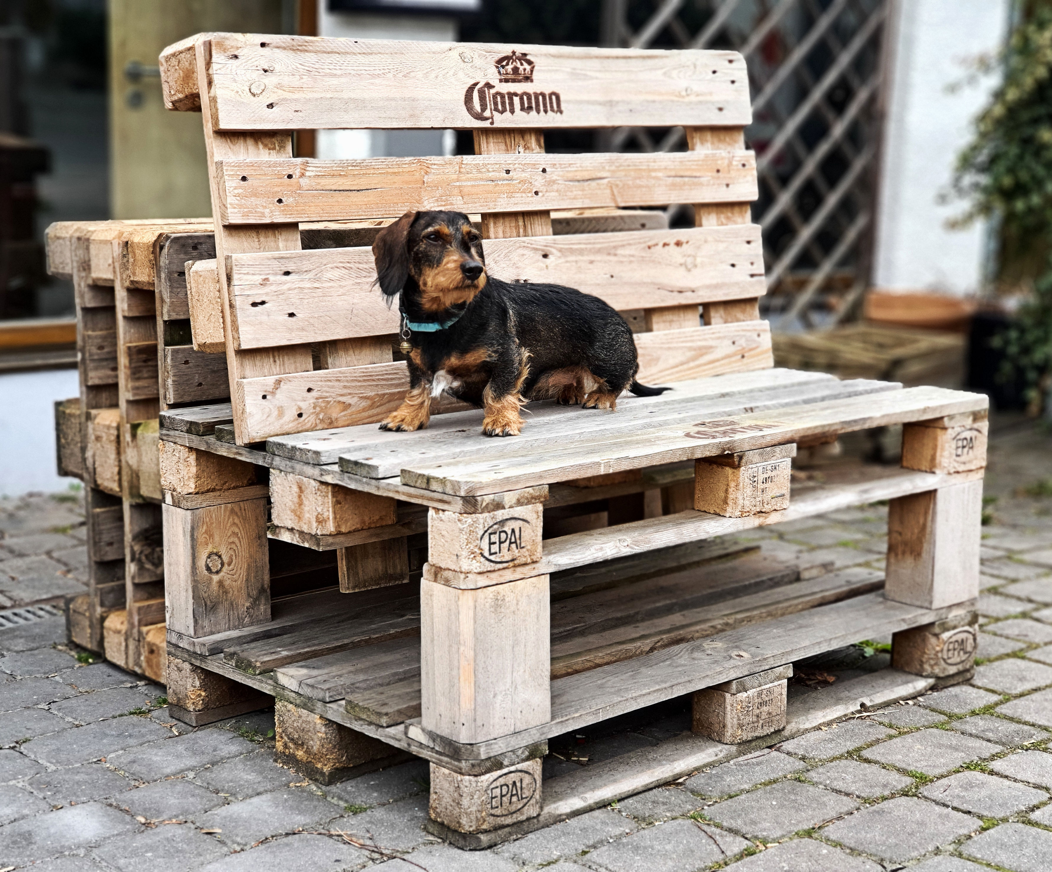 Sitzbank aus recycelten Corona-Bier EPAL-Transportpaletten, vor einer geschlossenen Kneipe während der Corona-Pandemie Ende März 2020